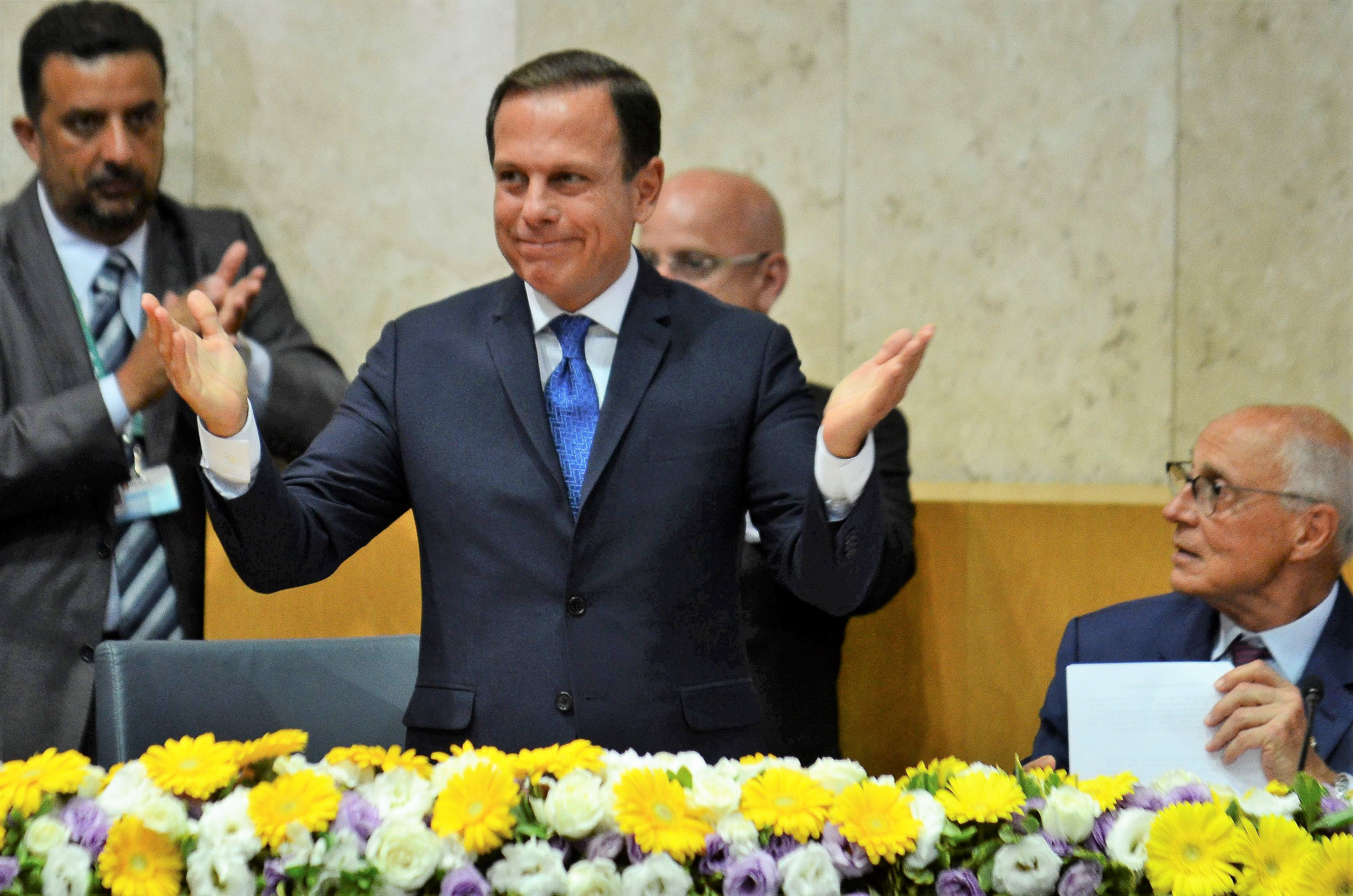 Posse de João Doria como prefeito da cidade de São Paulo, em cerimônia na Câmara Municipal em 1 de janeiro de 2017.